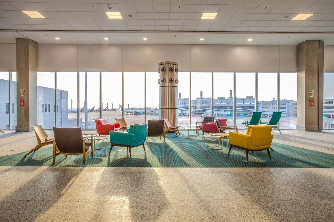 Vista para o pátio do Aeroporto do Galeão a partir do Píer Sul.